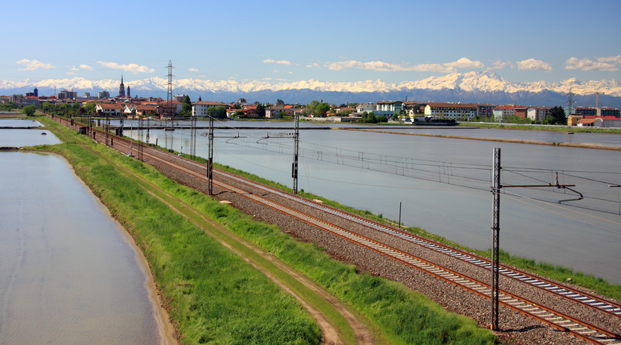 Un tratto della ferrovia Torino-Milano alle porte di Novara, in direzione Milano